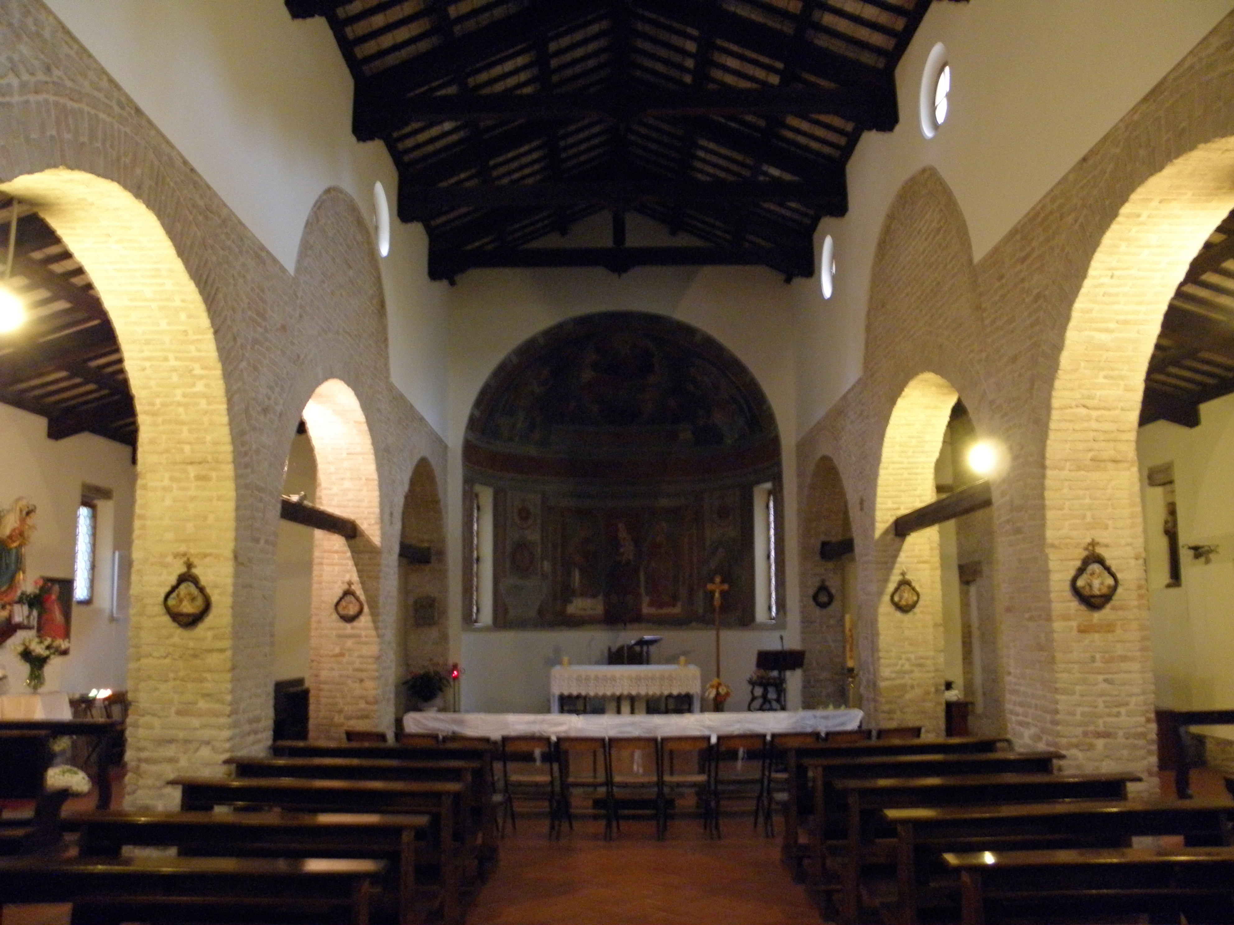 Pisignano, frazione di Cervia, pieve di Santo Stefano: interno, navata centrale.